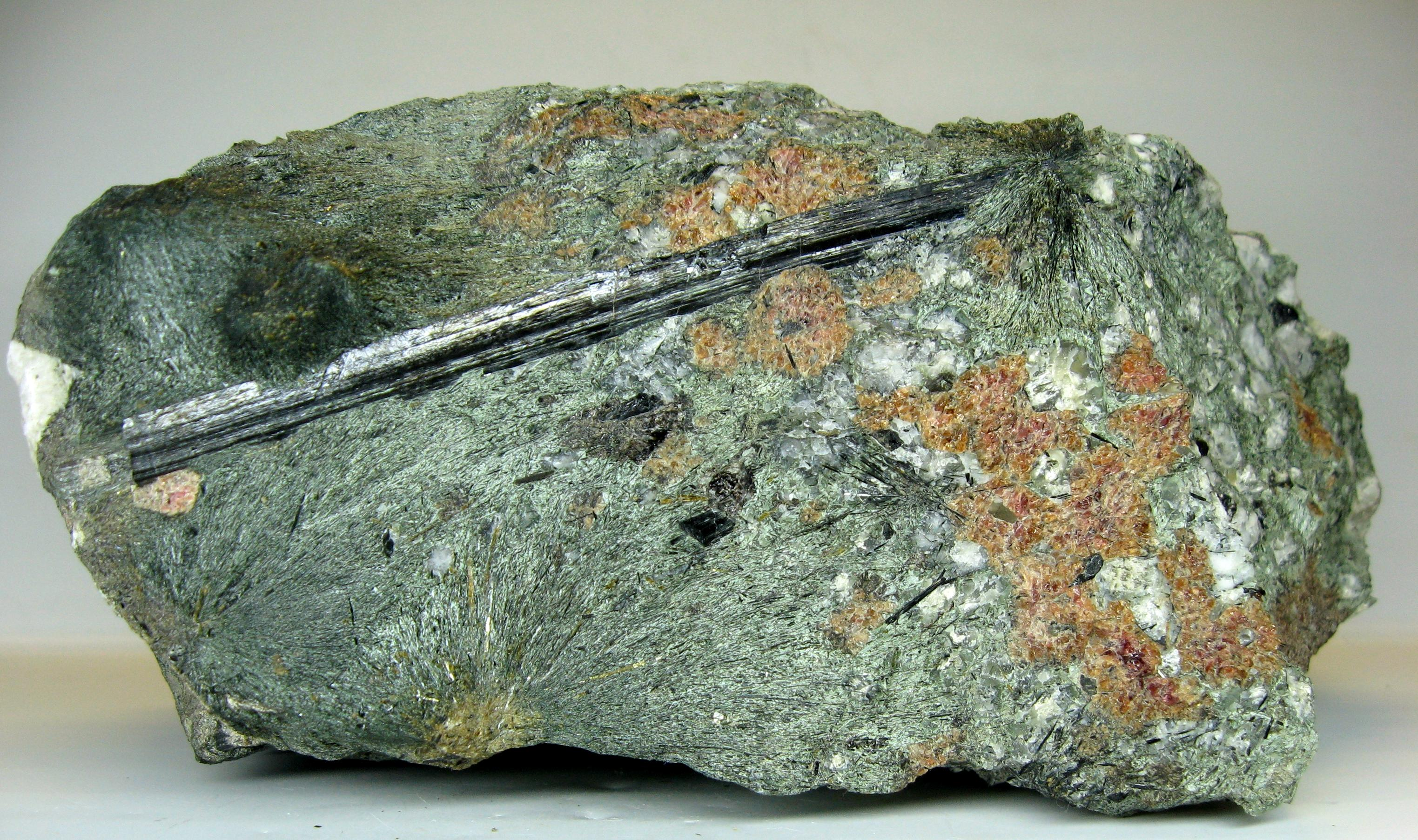 Кристалл черного эгирина в массе волокнистого зеленого эгирина. Хибины, Мурманская область.